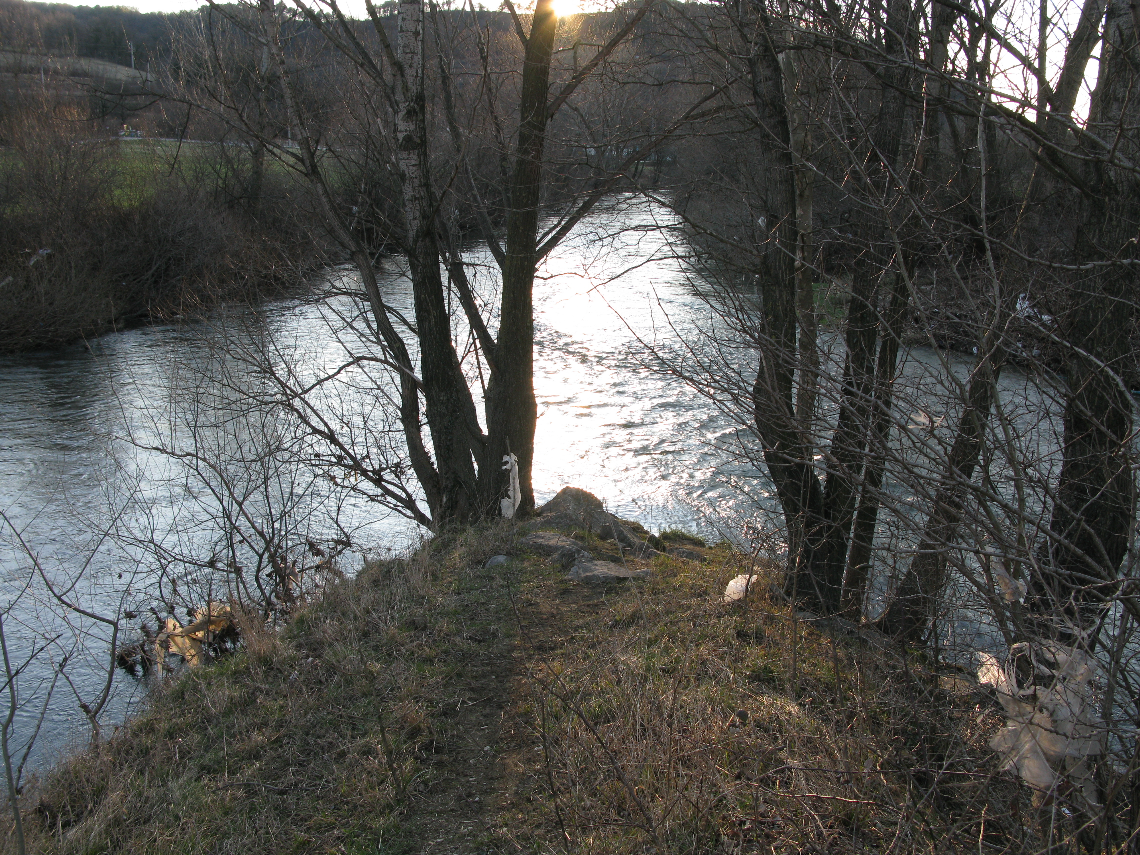 Sotočje Vipave in Hublja. Confluence of rivers Vipava and Hubelj.